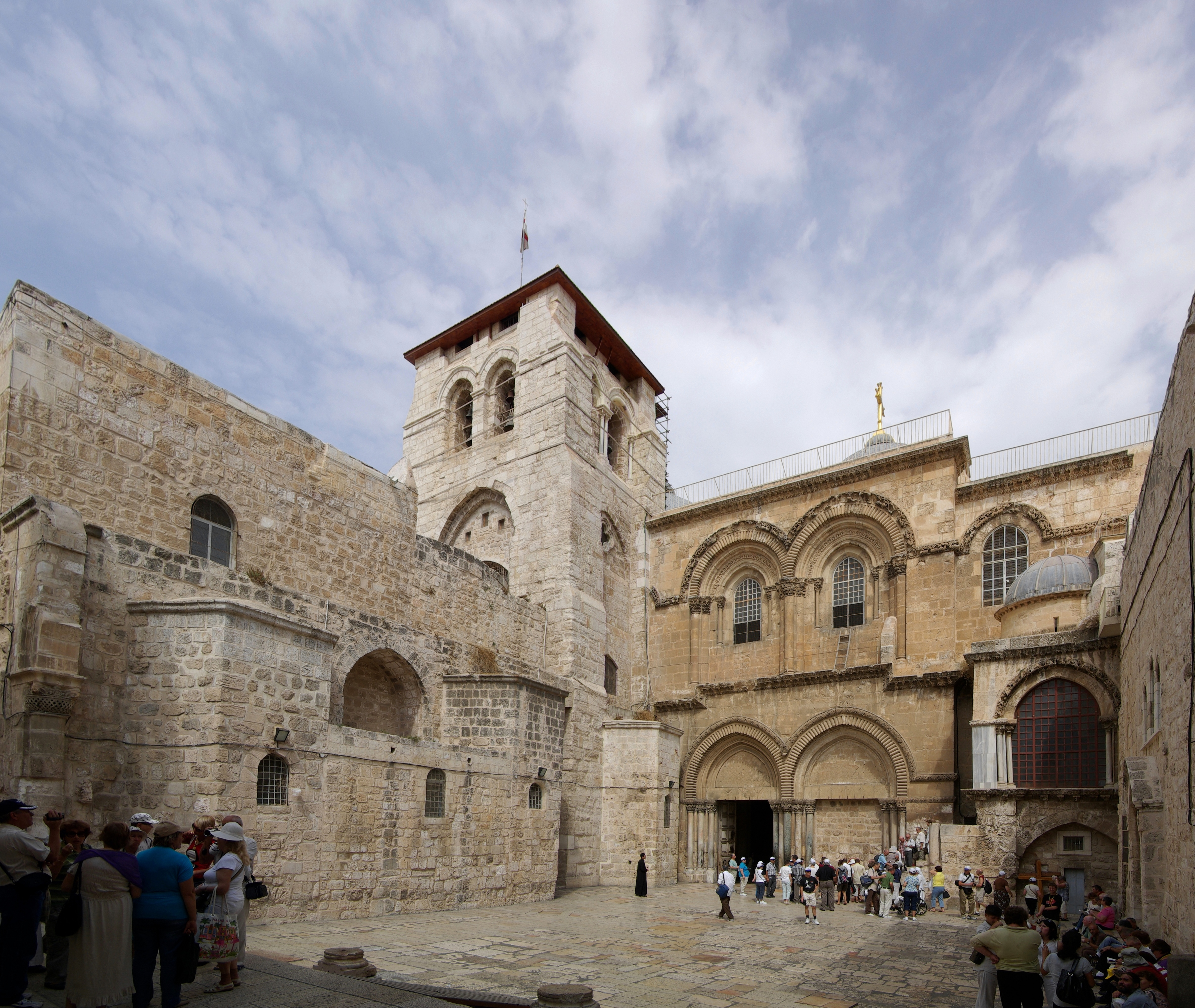 Jerusalem, Grabeskirche, Eingangsbereich